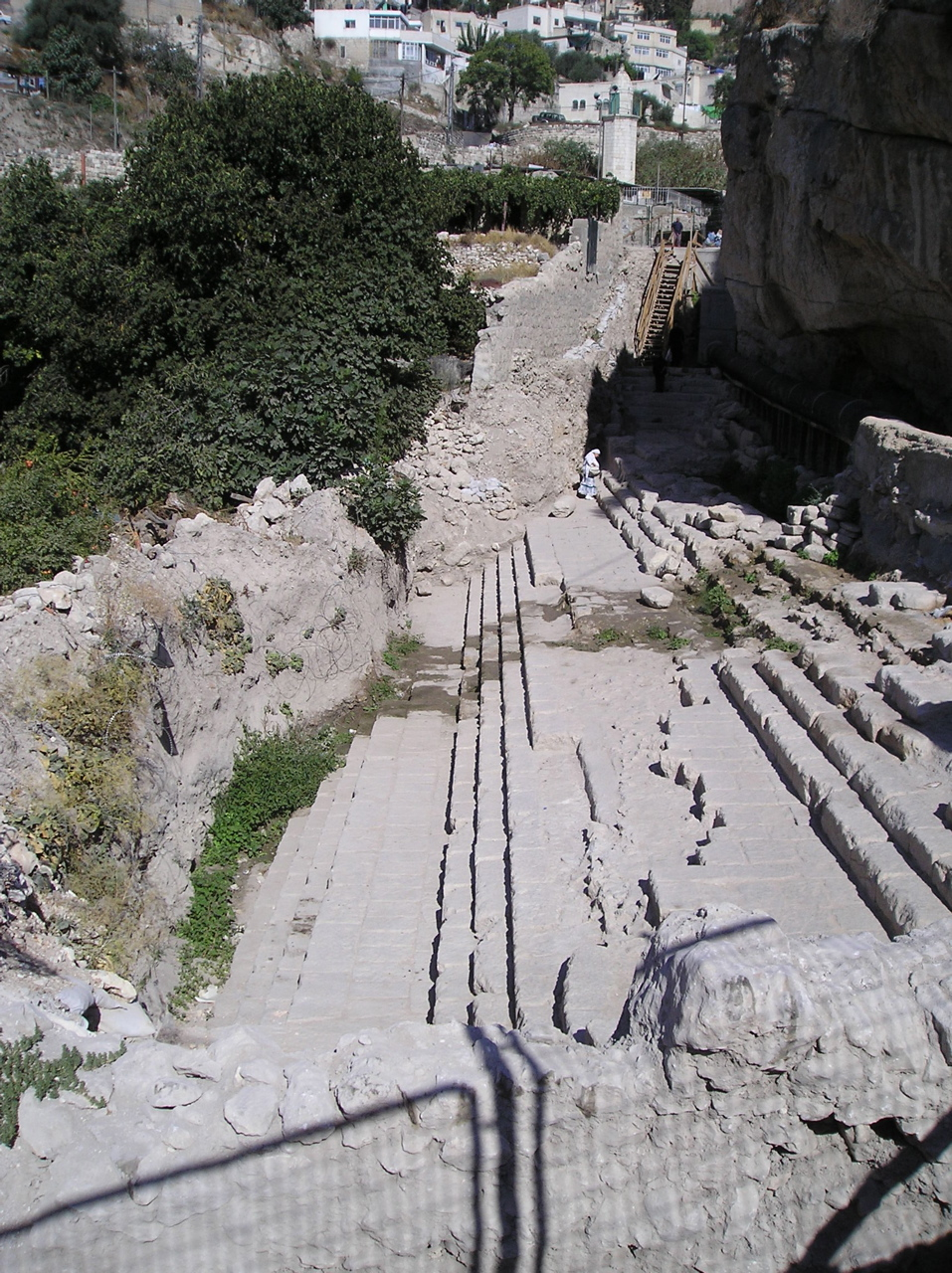 Pool of Siloam - Jerusalem (Photo: Abraham, September 2005)